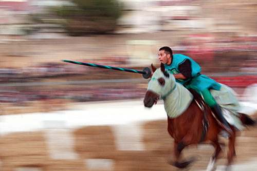 PIAZZA_ARMERINA_10-08-14_0441